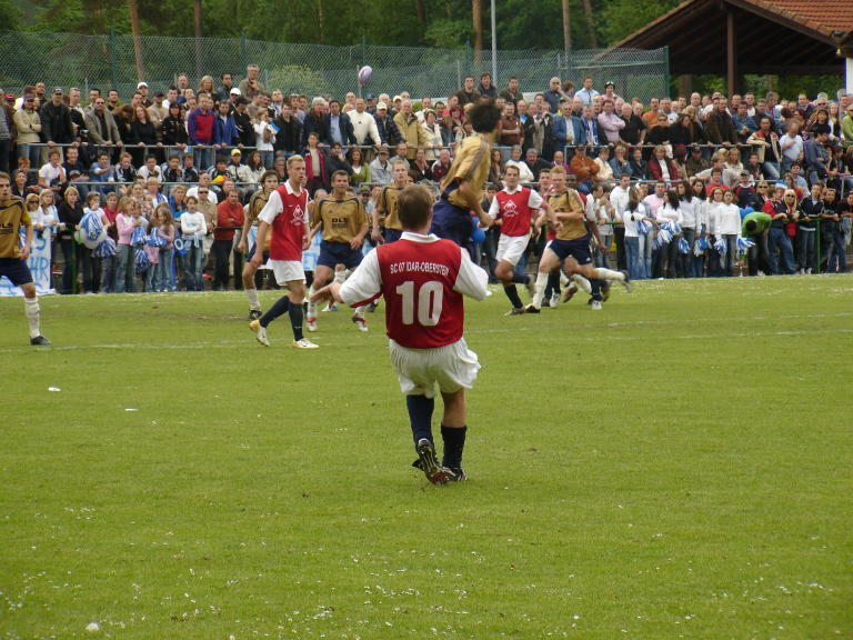 Verbandsligaspiel Idar-Hohenecken